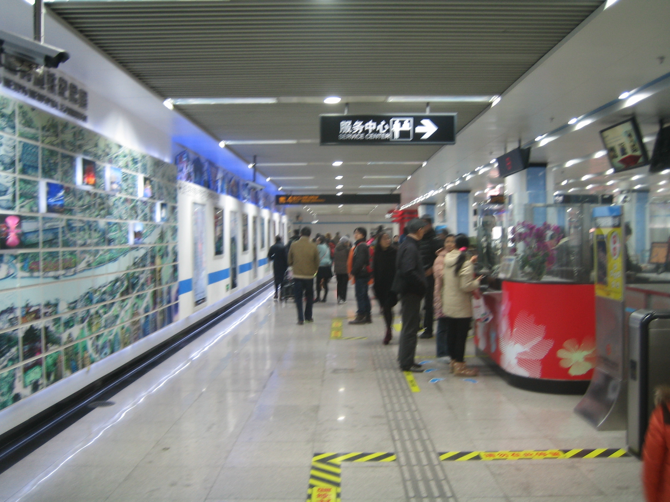 上海地铁中华艺术宫站内景。